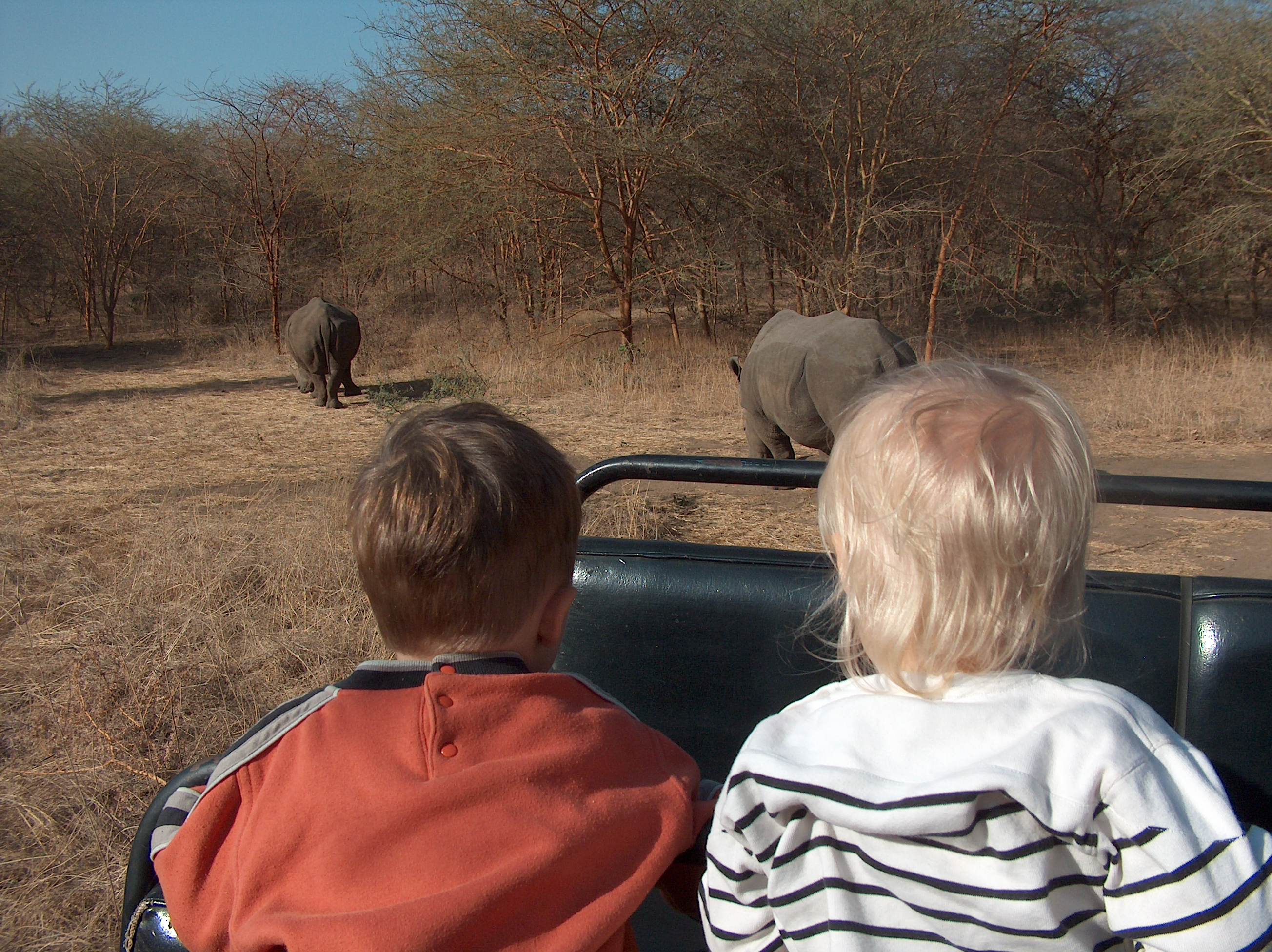 Rhinocéros dans la Réserve de Bandia (Sénégal)